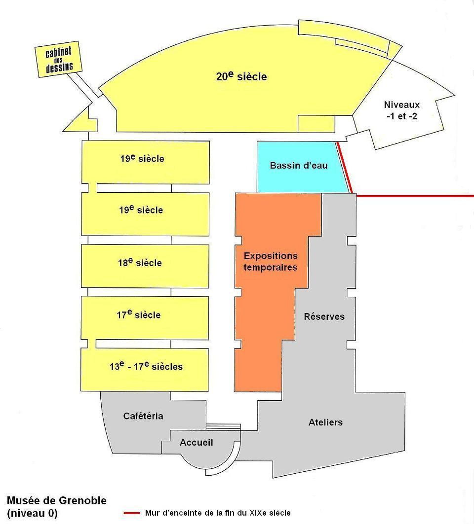 Plan du niveau 0 du musée de Grenoble